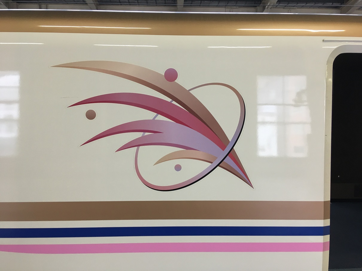 上越新幹線用のE7系新幹線にラッピングされているロゴマーク